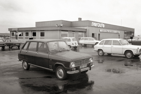 Primo centro Norauto a Englos, vicino a Lille (Francia)